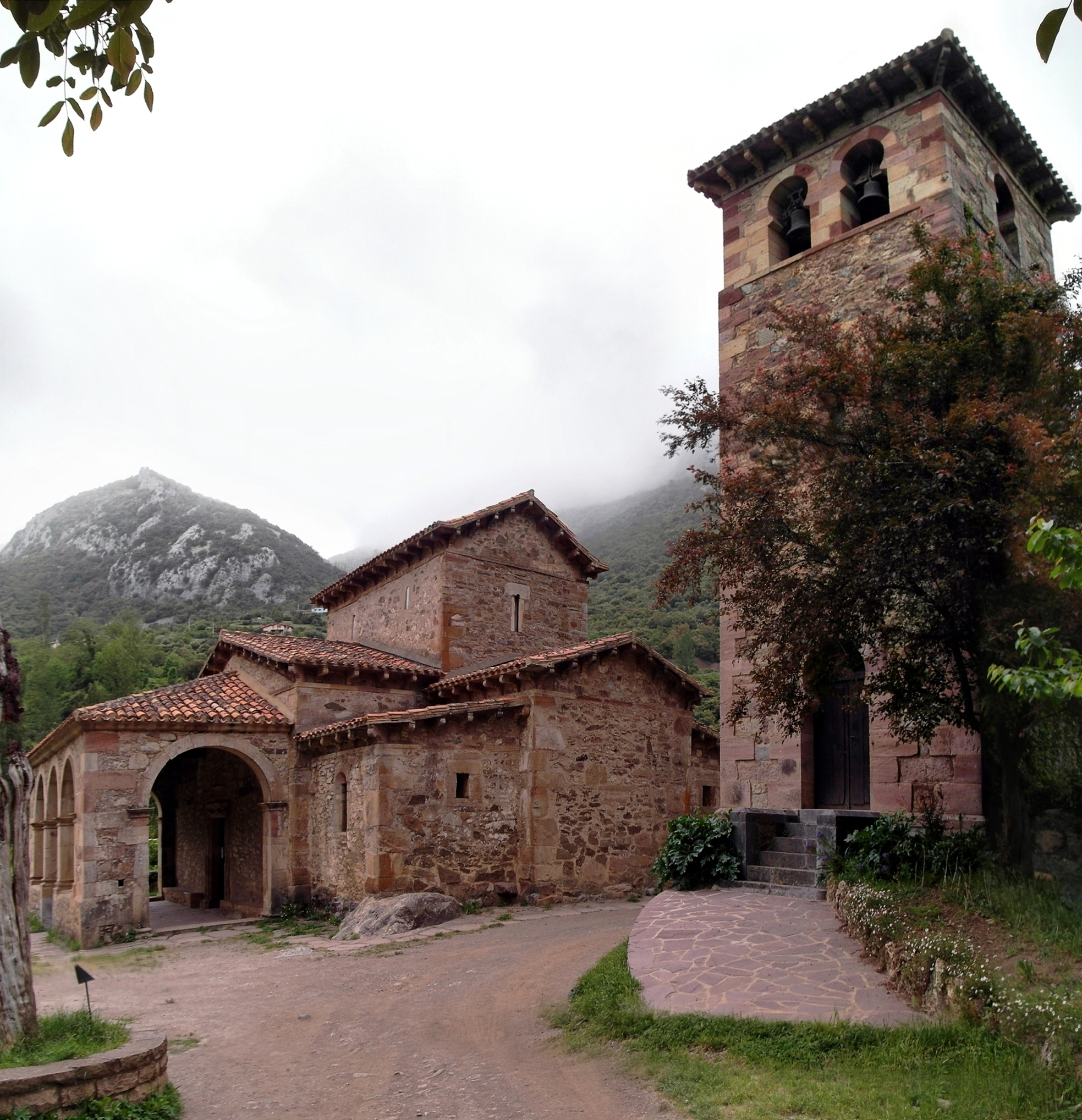 Iglesia de Santa María (Lebeña). 2012-05-18